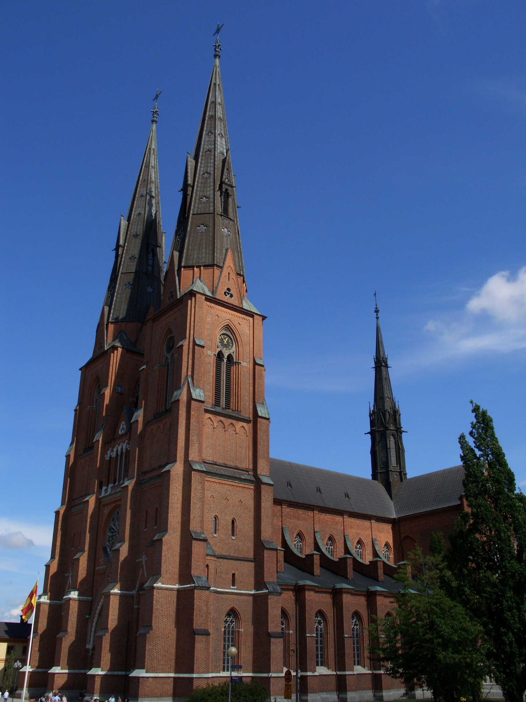 Uppsala domkyrka